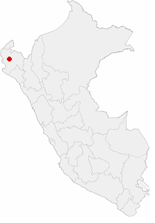 Ubicacion de la Ciudad de Piura en la Republica del Perú, Imagen modificada por Discjockey.